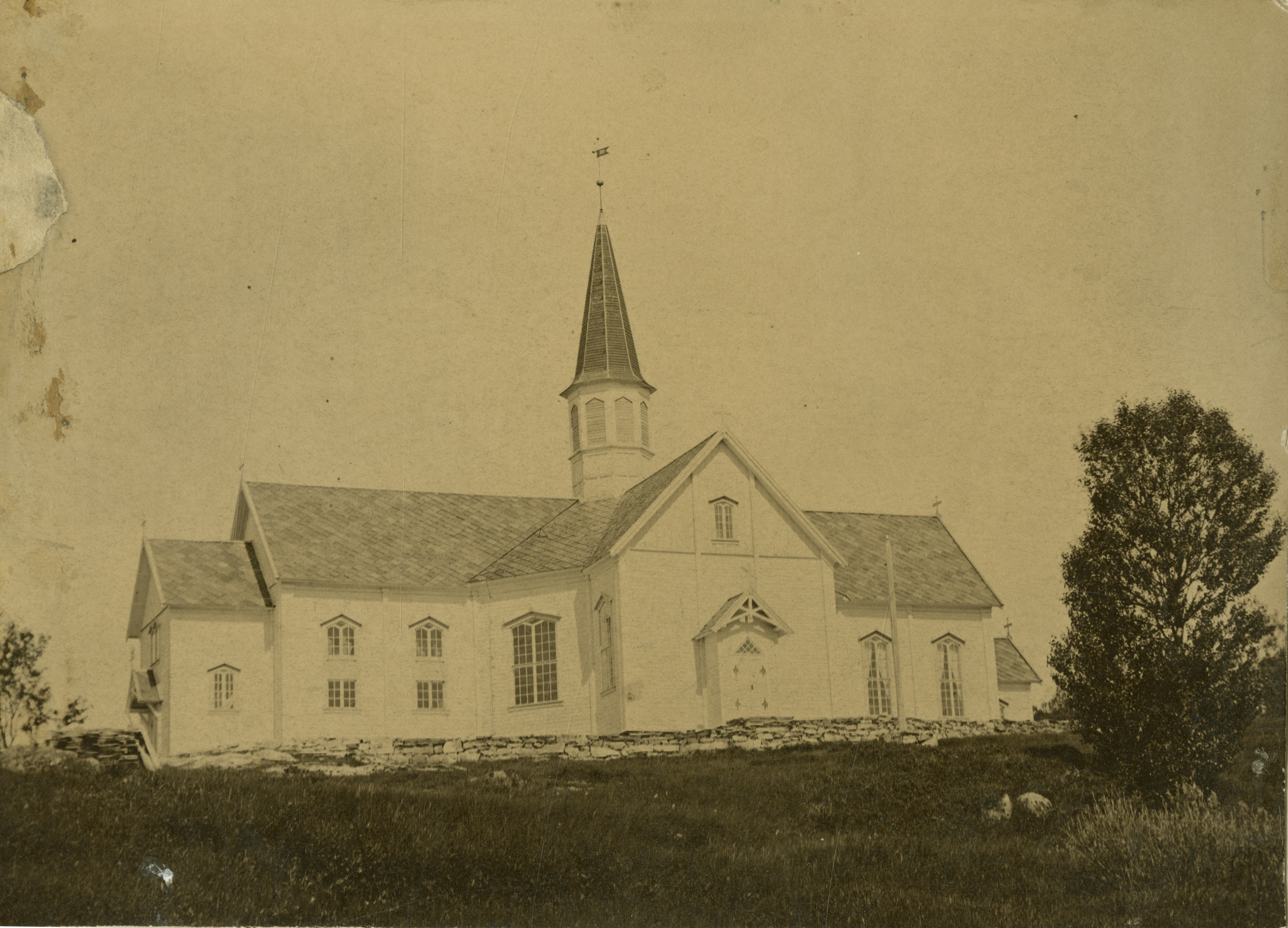 Hemnes kirke i Hemnes, Nordland